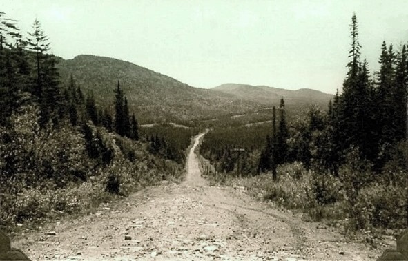 Route du Parc des Laurentides en 1920